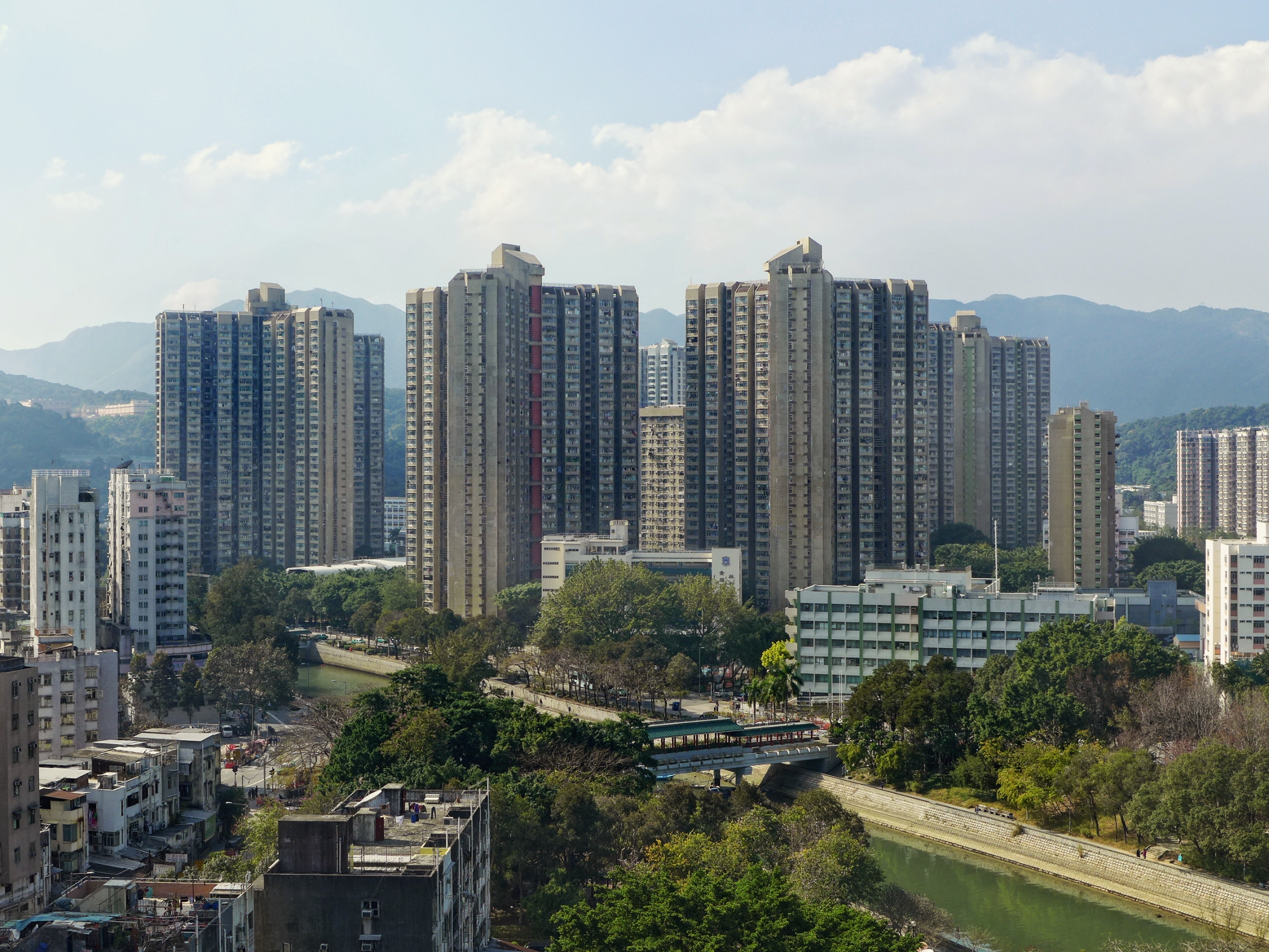 Tai Wo Estate